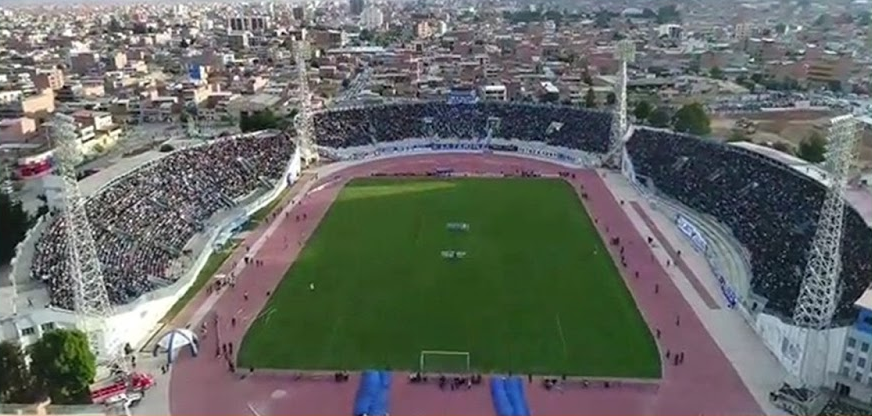 Estadio Jesús Bermúdez